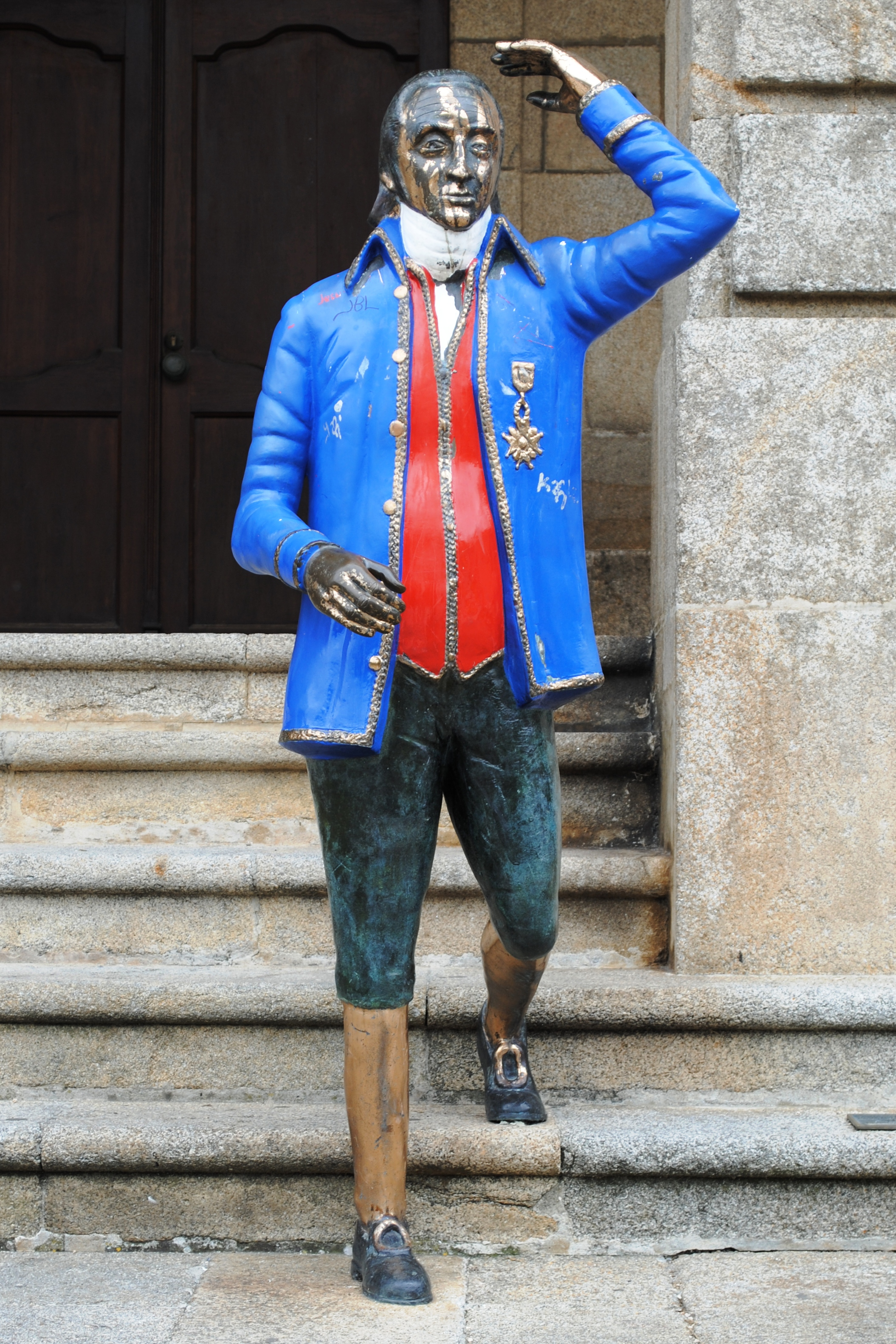 Véxase o título e as categorías